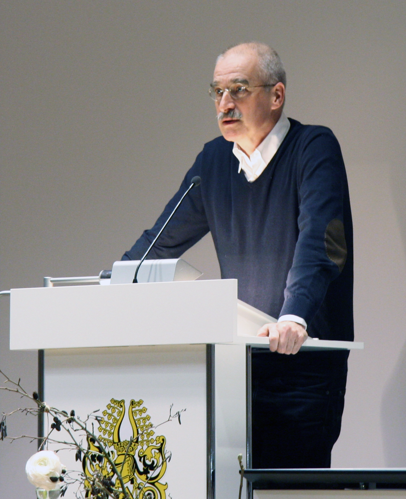 Sergej Lochthofen während einer Buchlesung in der Stadtbibliothek Nordhausen im Januar 2015.